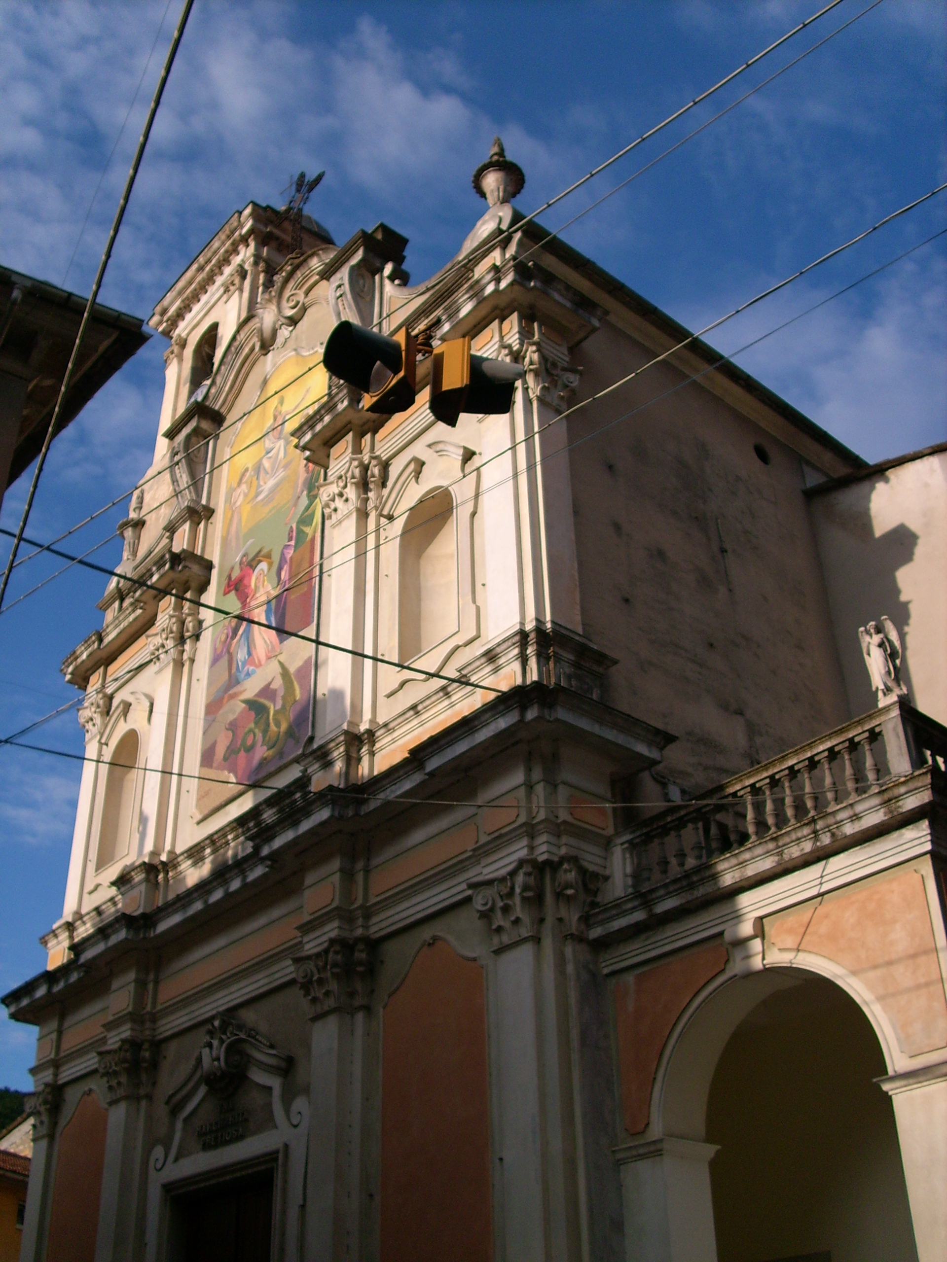 Chiesa di santa Margherita d'Antiochia di Pontedassio, Liguria, Italia